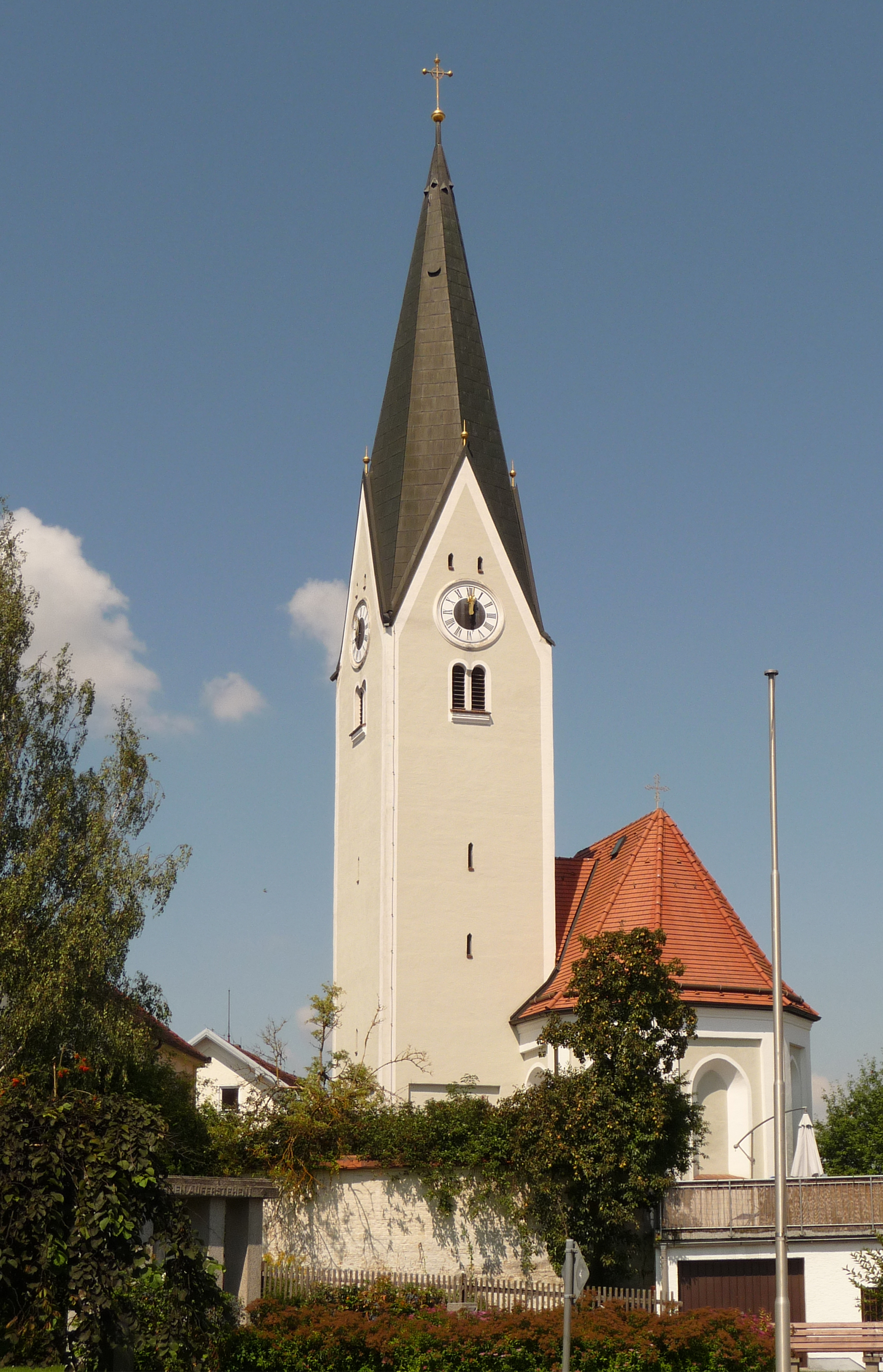 Die Kirche St. Jakob in Geiselhöring, Am Lins 18